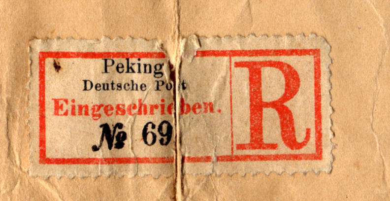 Einschreibe-Kleber von der Deutschen Post in Peking 1901